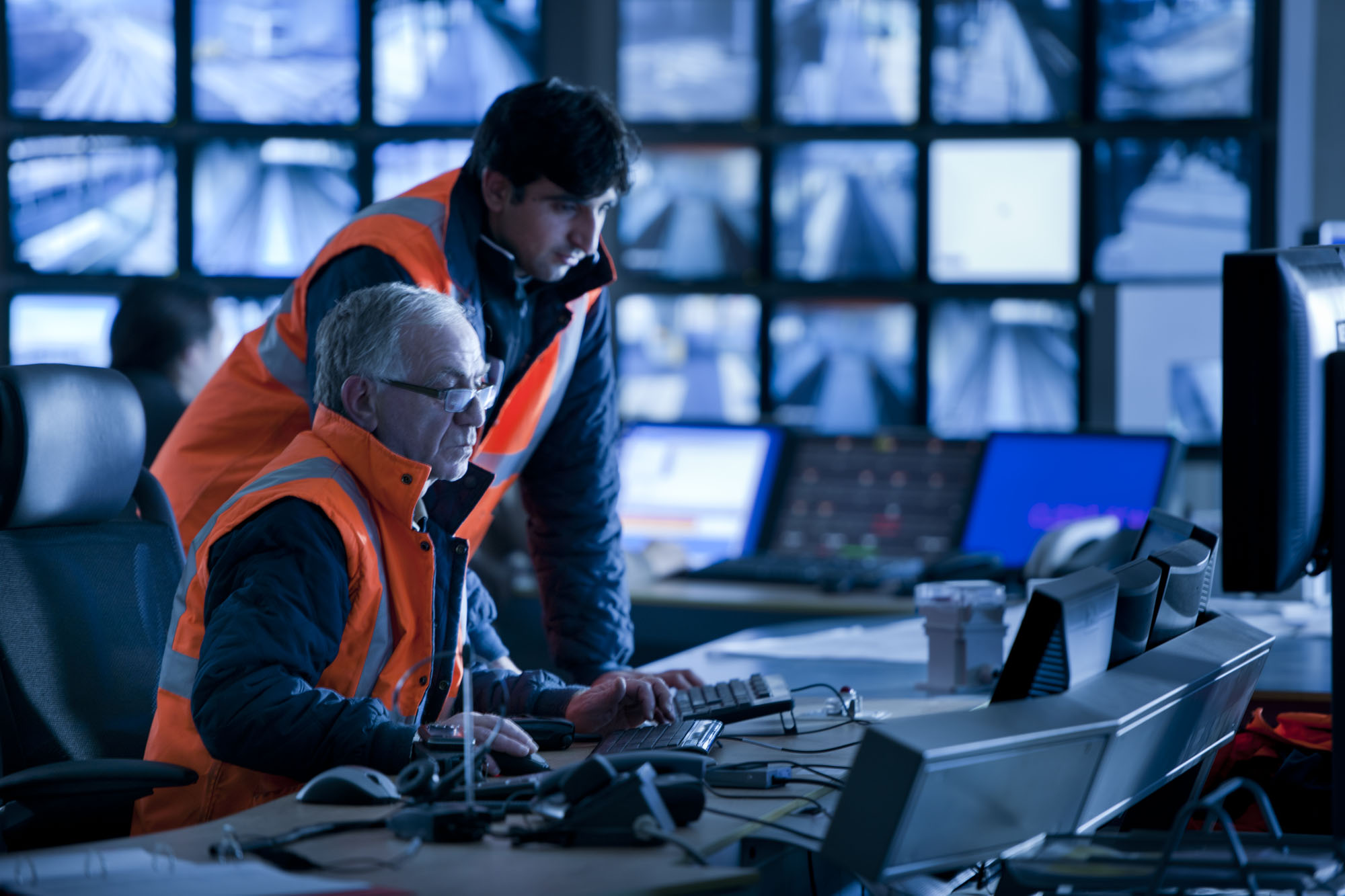 Sala di telecontrollo della nuova metropolitana leggera automatica di Brescia.